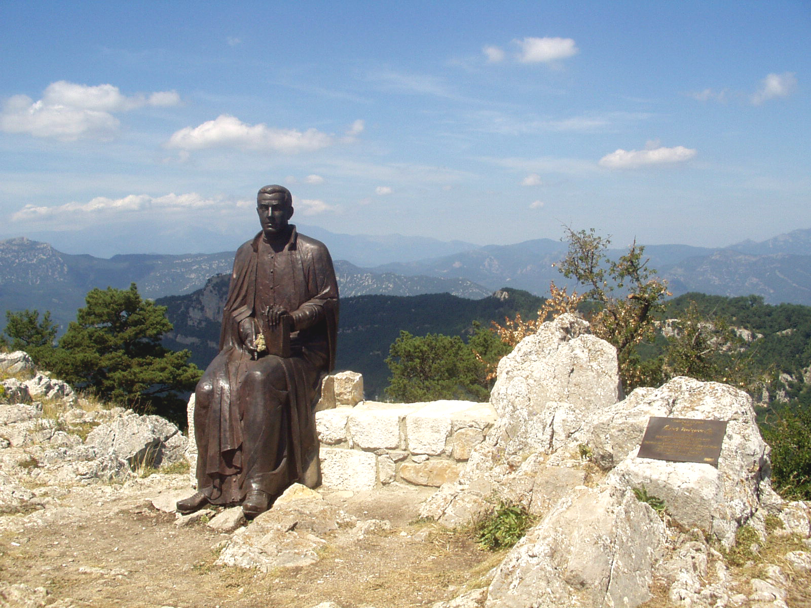 Monument dedicat a Jacinto Verdaguer a la Mare de Déu del Mont (Sculptor:Joan Ferrés i Curós, 2008)